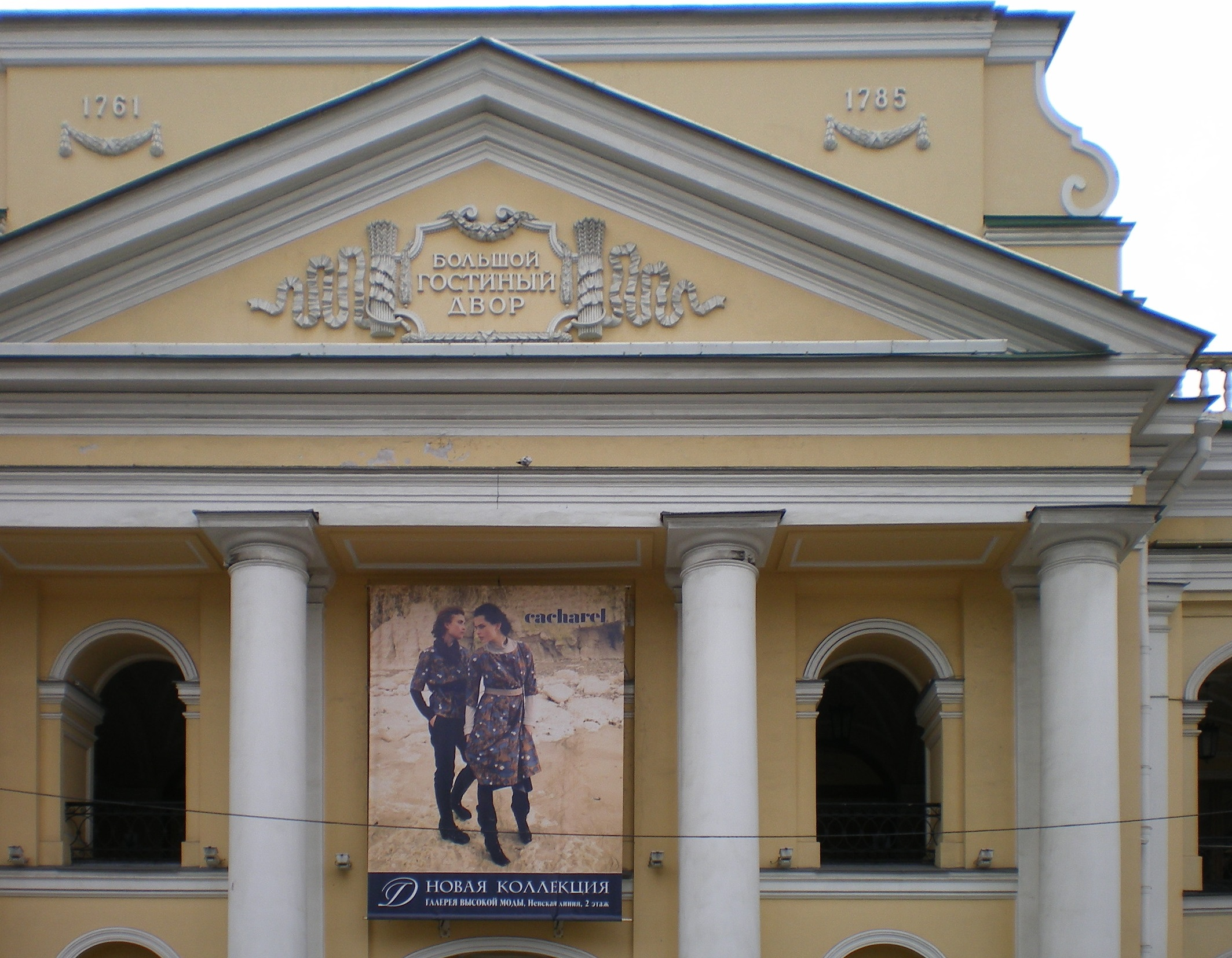 Гостиный двор. Фронтон, 2007 год.